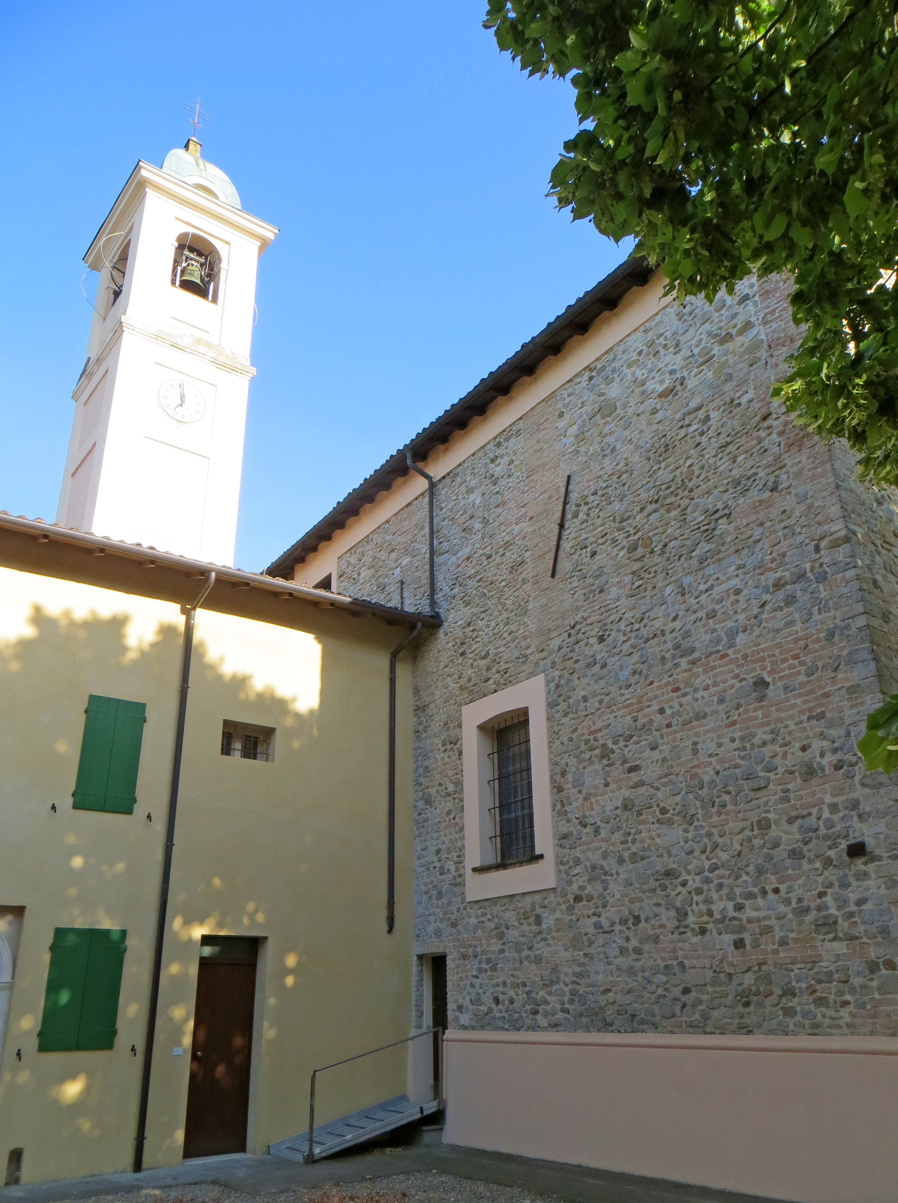 Chiesa di San Martino (Malandriano, Parma) - lato nord e campanile